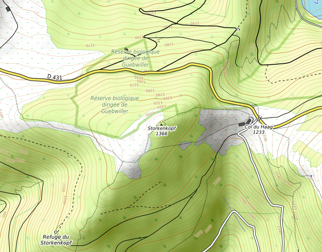 carte réalisée sur umap This map may be incomplete, and may contain errors. Don't rely solely on it for navigation.